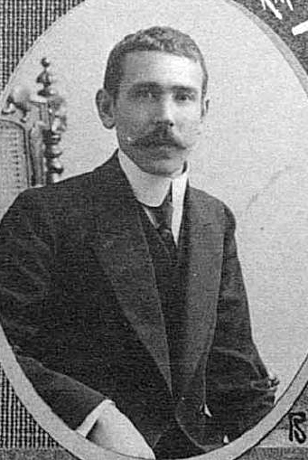 Валентин Иванович Хаустов (1884, Рязанская губерния — после 1922[1]) — токарь, депутат IV Государственной думы от Уфимской губернии (1912—1917), член ВЦИК.